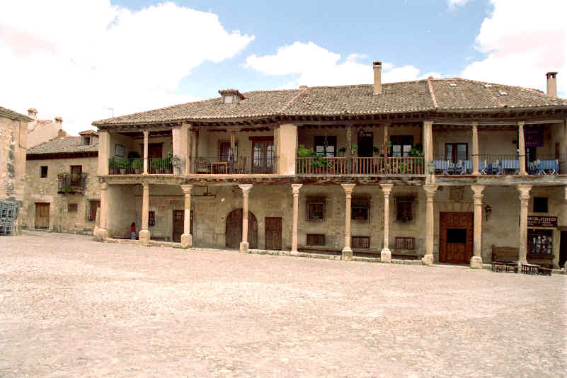 Plaza Mayor de Pedraza en la provincia de Segovia (España). Tomada por --JMSE el 2 de Julio de 2003 y cedida a Wikipedia.